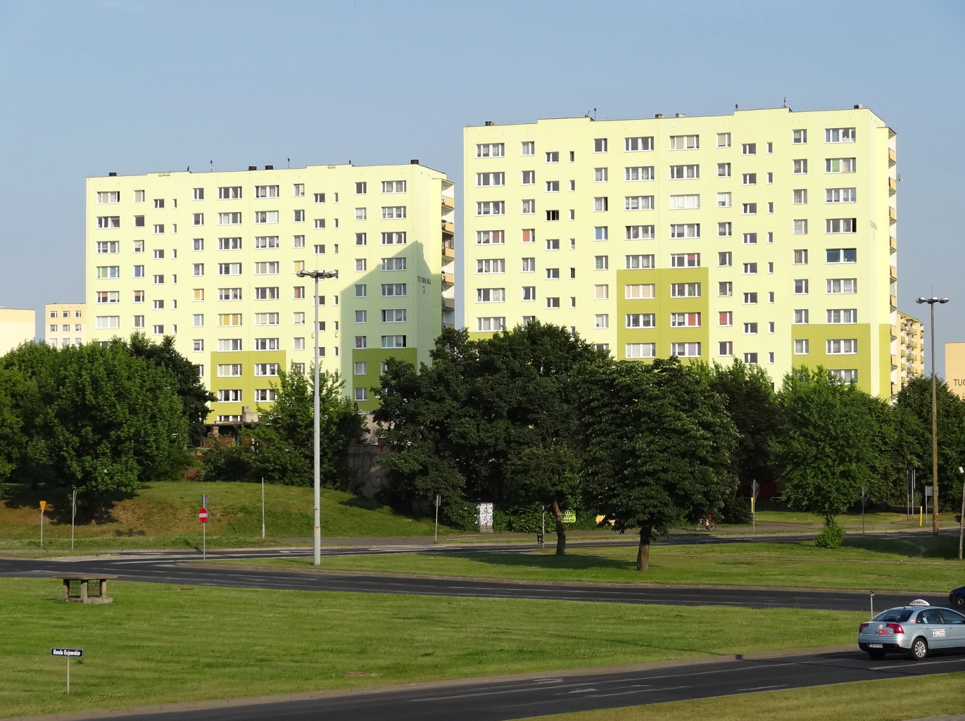 Widok na rondo Kujawskie oraz osiedle Wzgórze Wolności w Bydgoszczy